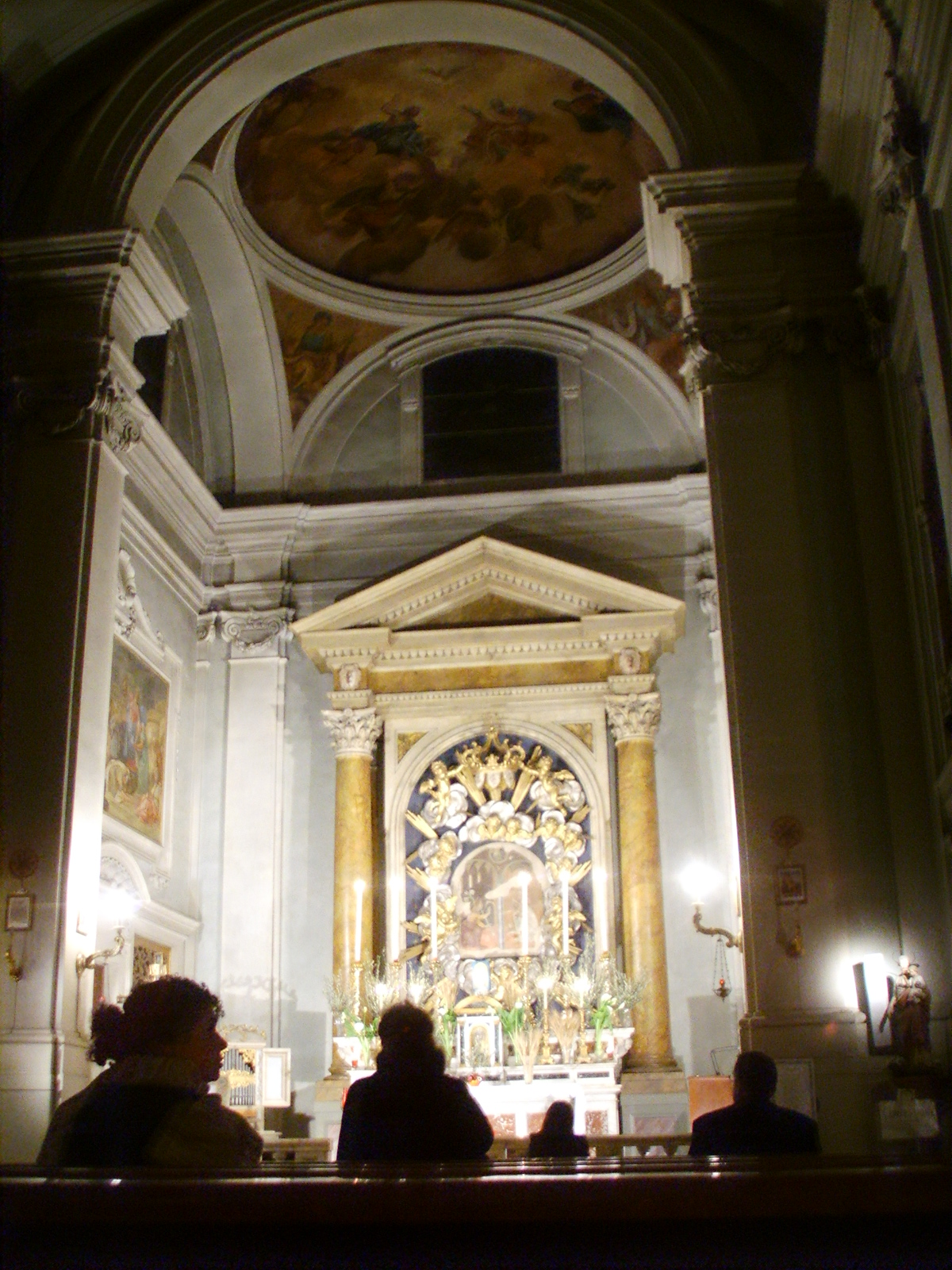 Santa_Maria_de'_Ricci_interno2